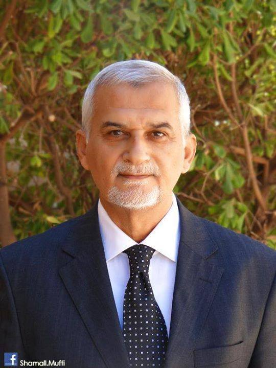 شمال المفتي